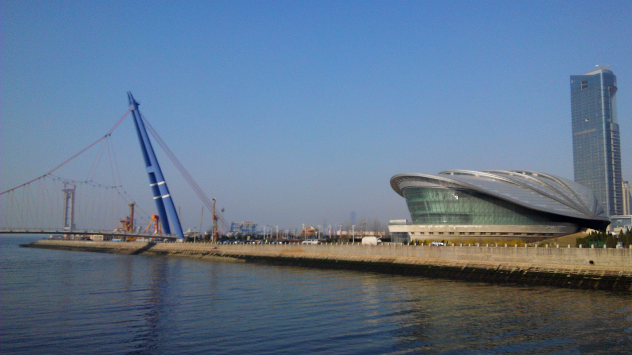 马栏河畔的大连市贝壳博物馆 摄于2014大连春季考察团